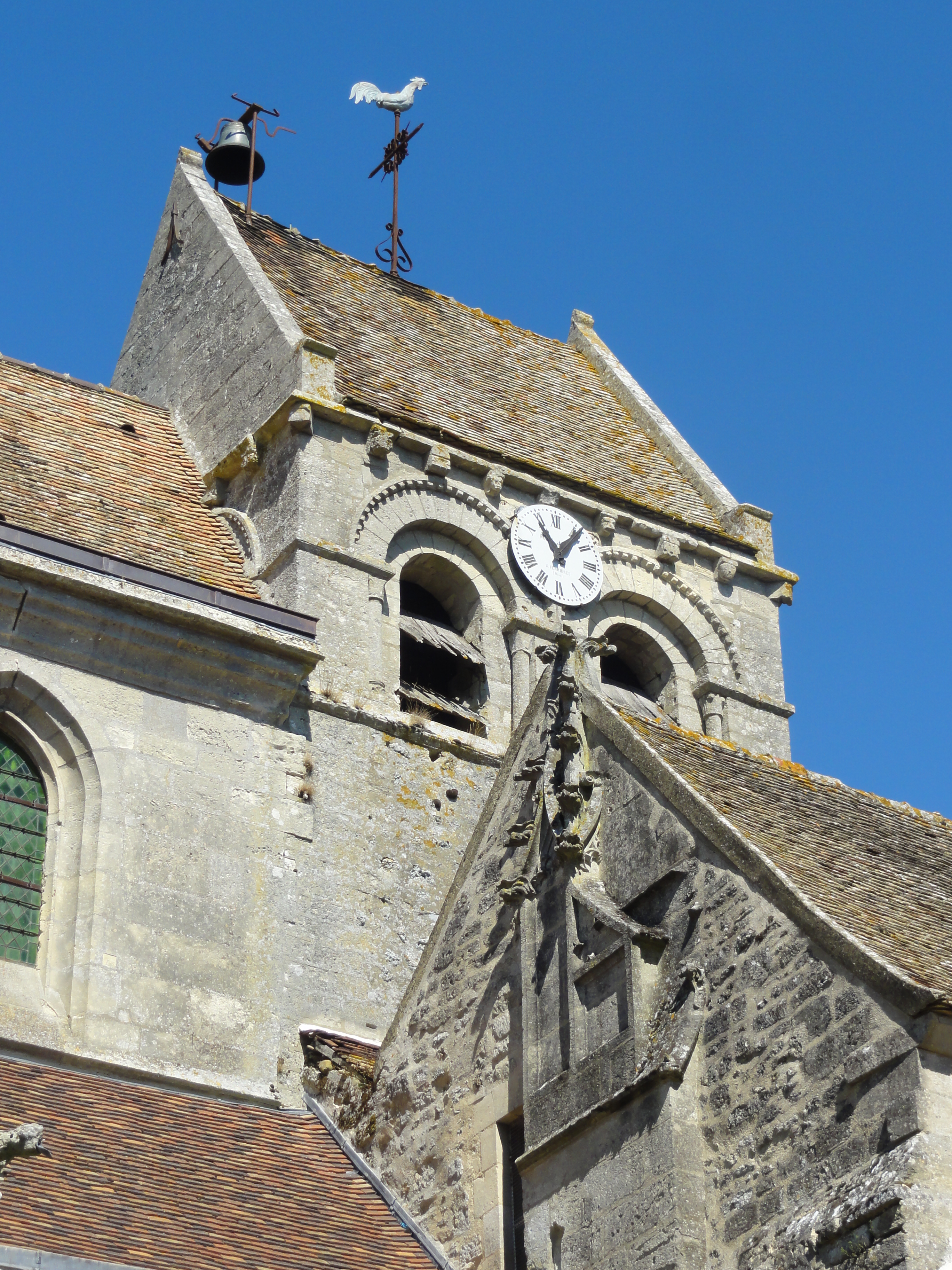 Église Saint-Denis de Serans - voir titre.